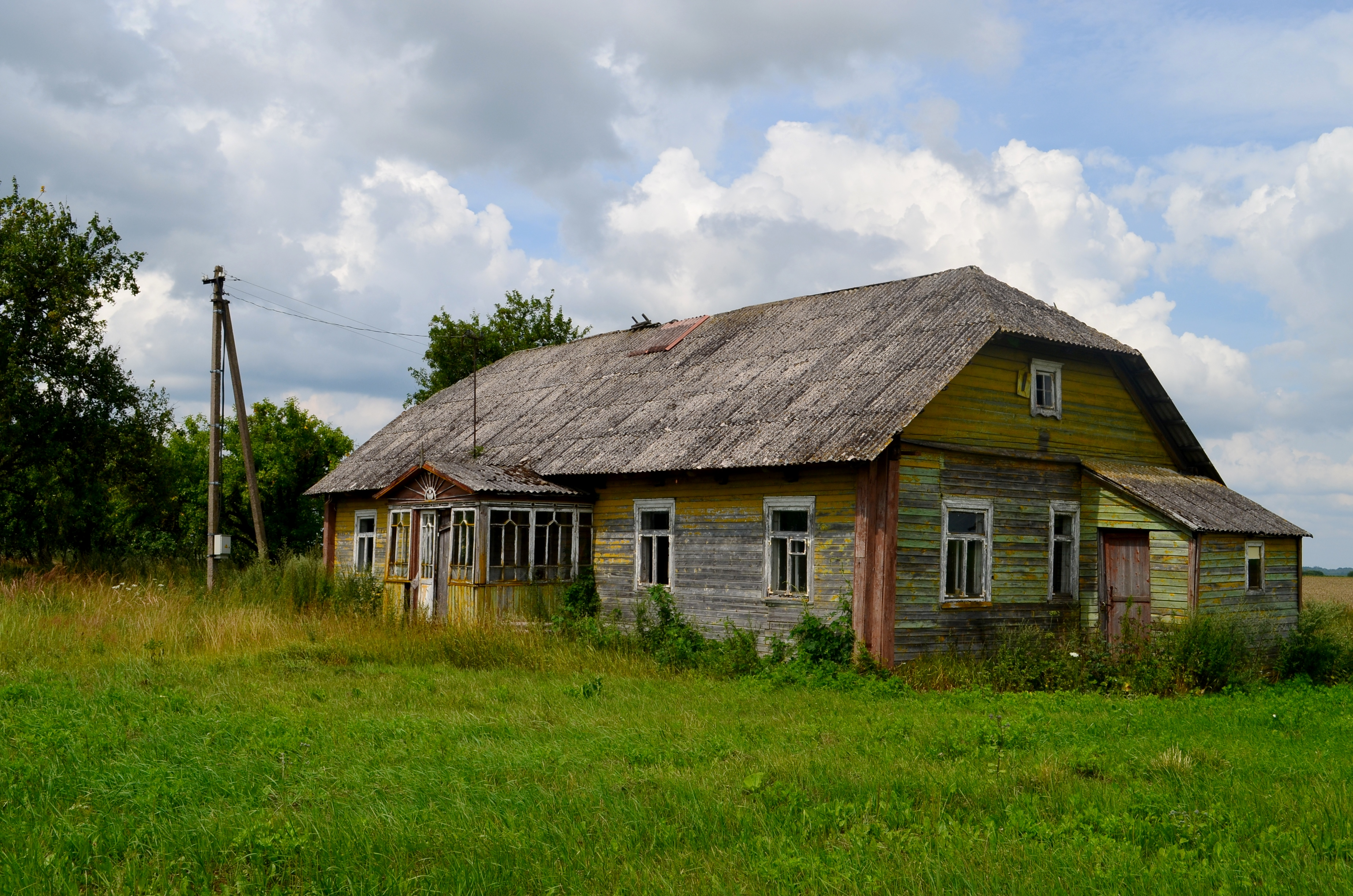 Margių k., Šėtos sen., Kėdainių raj.